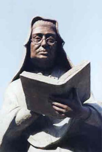 Escultura a Madre Alberta Giménez Adrover erigida en su ciudad natal: Pollensa, Mallorca, España